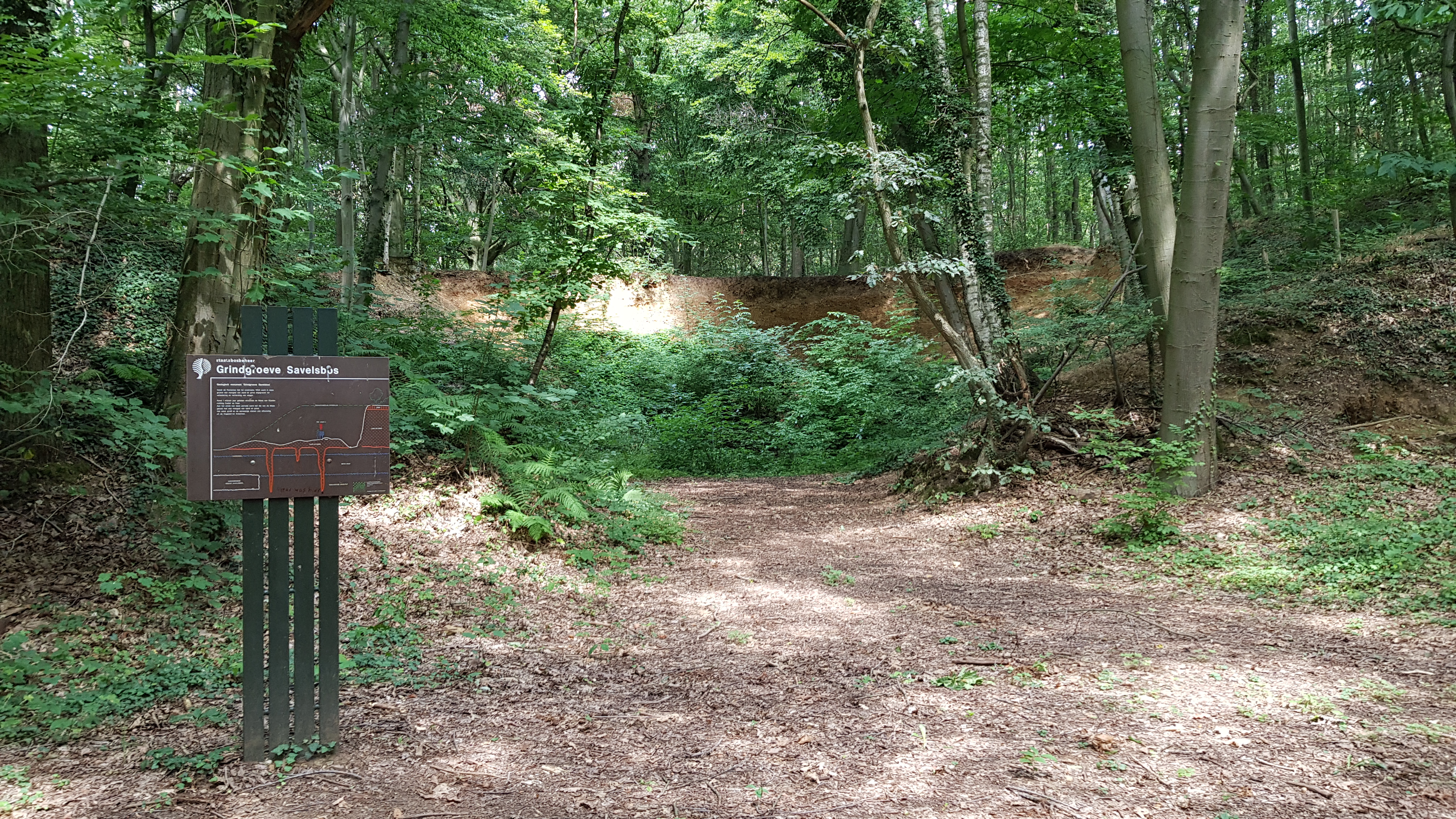 Grindgroeve Savelsbos, Gronsveld, Nederland